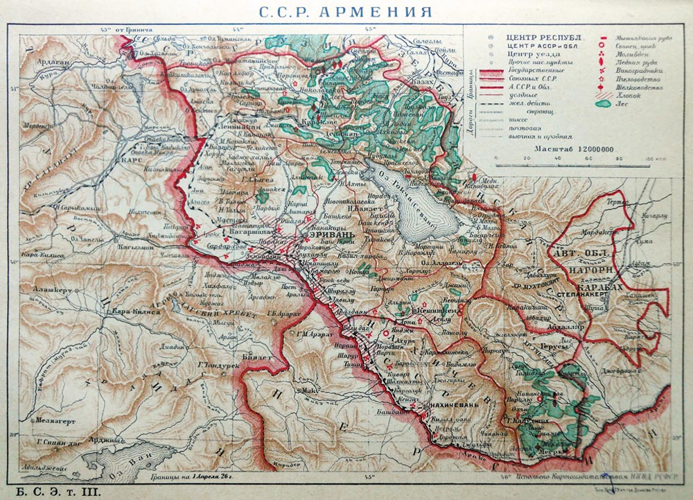 Gränserna för Armenien och Karabach enligt Sovjet encyclopedia 1926. Noterna avsaknaden av gräns mellan Turkiet och Nachijevan samt nutida gapet mellan Armenien och Karabach.